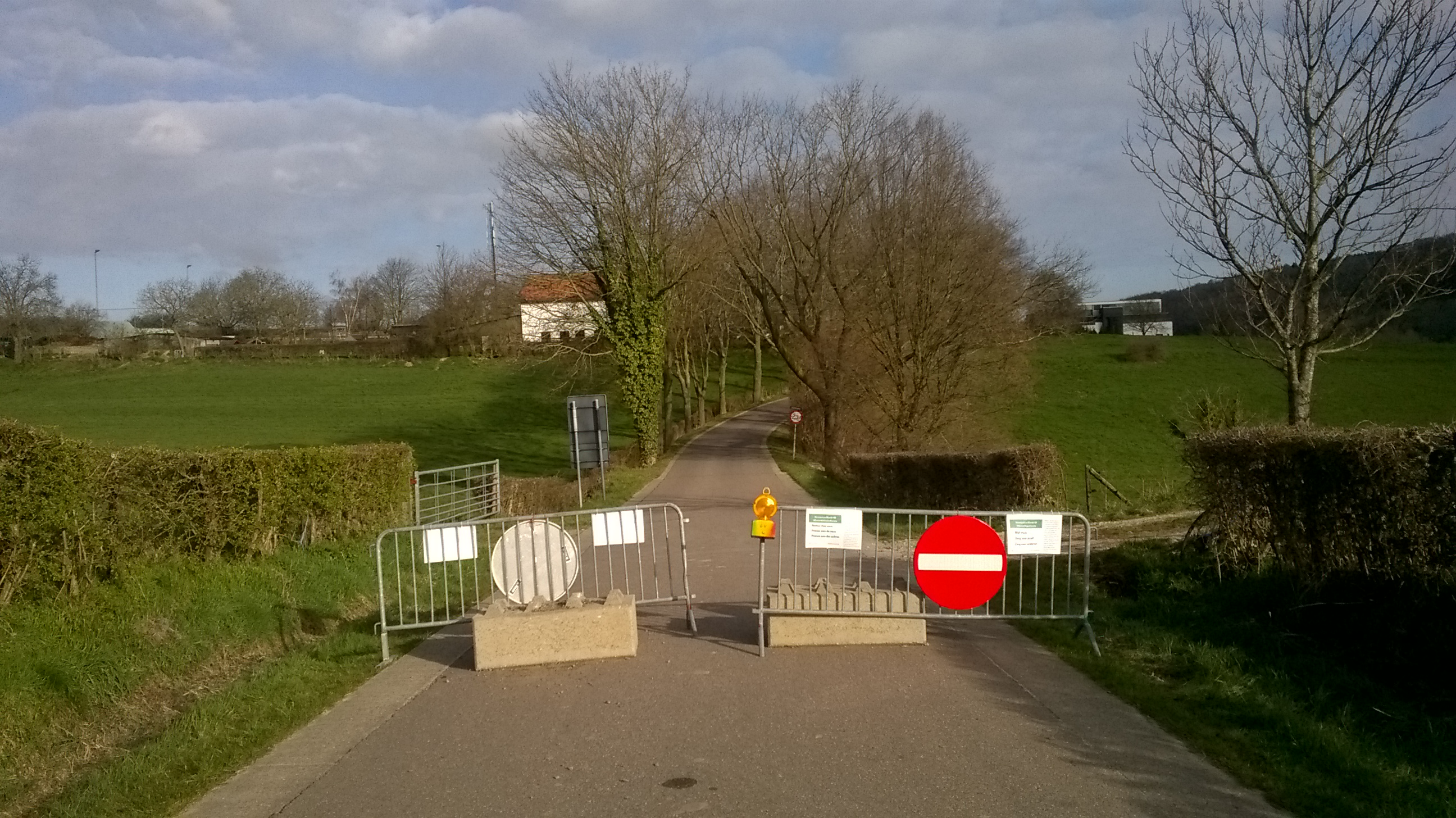 Wegens de wereldwijde uitbraak van het coronavirus Covid-19 zijn de grenzen versperd van België. De foto is genomen vanuit het Belgische Nurop richting Slenaken in Nederland. Er liggen twee betonblokken en er staan twee dranghekken. Op de dranghekken zijn papieren bevestigd met een beschrijving van de maatregelen in het Nederlands en in het Frans. Het gras links in de berm is platgereden, omdat een voertuig nog tussen de wegkant en het betonblok past.